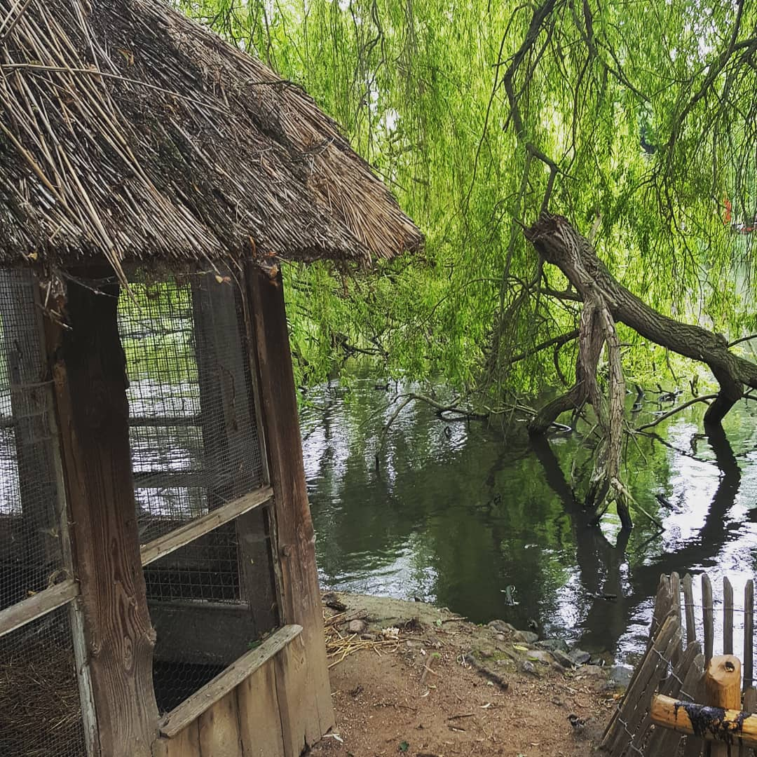 Zoo Grömitz, Grünanlagen, 2020